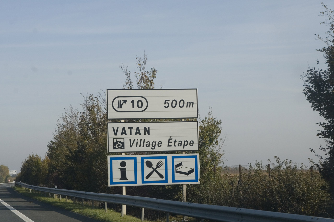 Vatan, village-étape. Panneau sur l'Autoroute A20 annonçant la commune de Vatan (Indre, France)